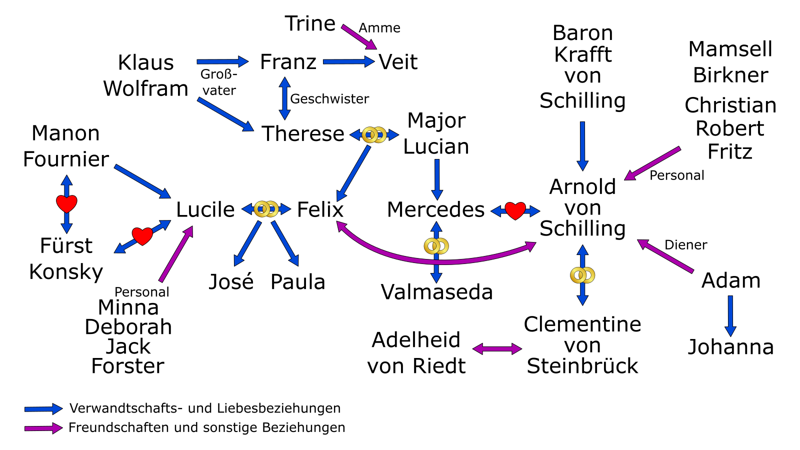 Figurenbeziehungen in E. Marlitts Roman "Im Schillingshof"